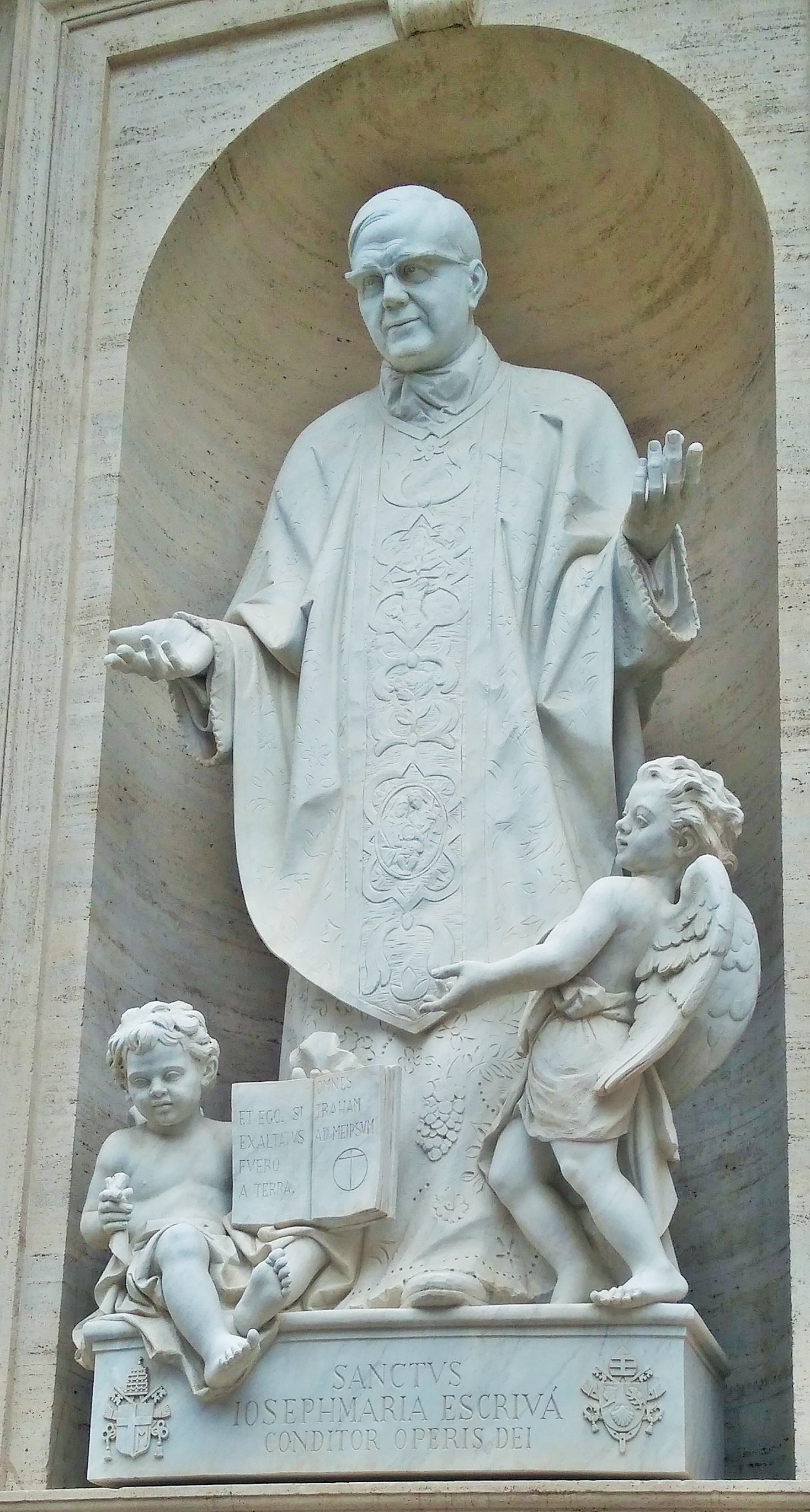 Statue de saint Josémaria, représenté vêtu des ornements sacerdotaux, dans une niche de la basilique Saint-Pierre de Rome, vue depuis la sacristie.